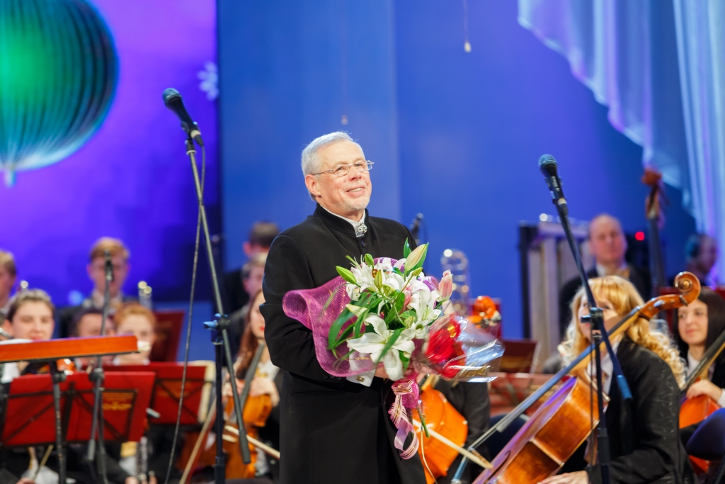 Юбилейный вечер-концерт «Симфония души» Заслуженного деятеля культуры Республики Беларусь, художественного руководителя и главного дирижера Заслуженного коллектива Республики Беларусь симфонического оркестра Молодечненского государственного музыкального колледжа имени М.К.Огинского Григория Сороко (проект «Новогодние вечера в Молодечно», 2014)